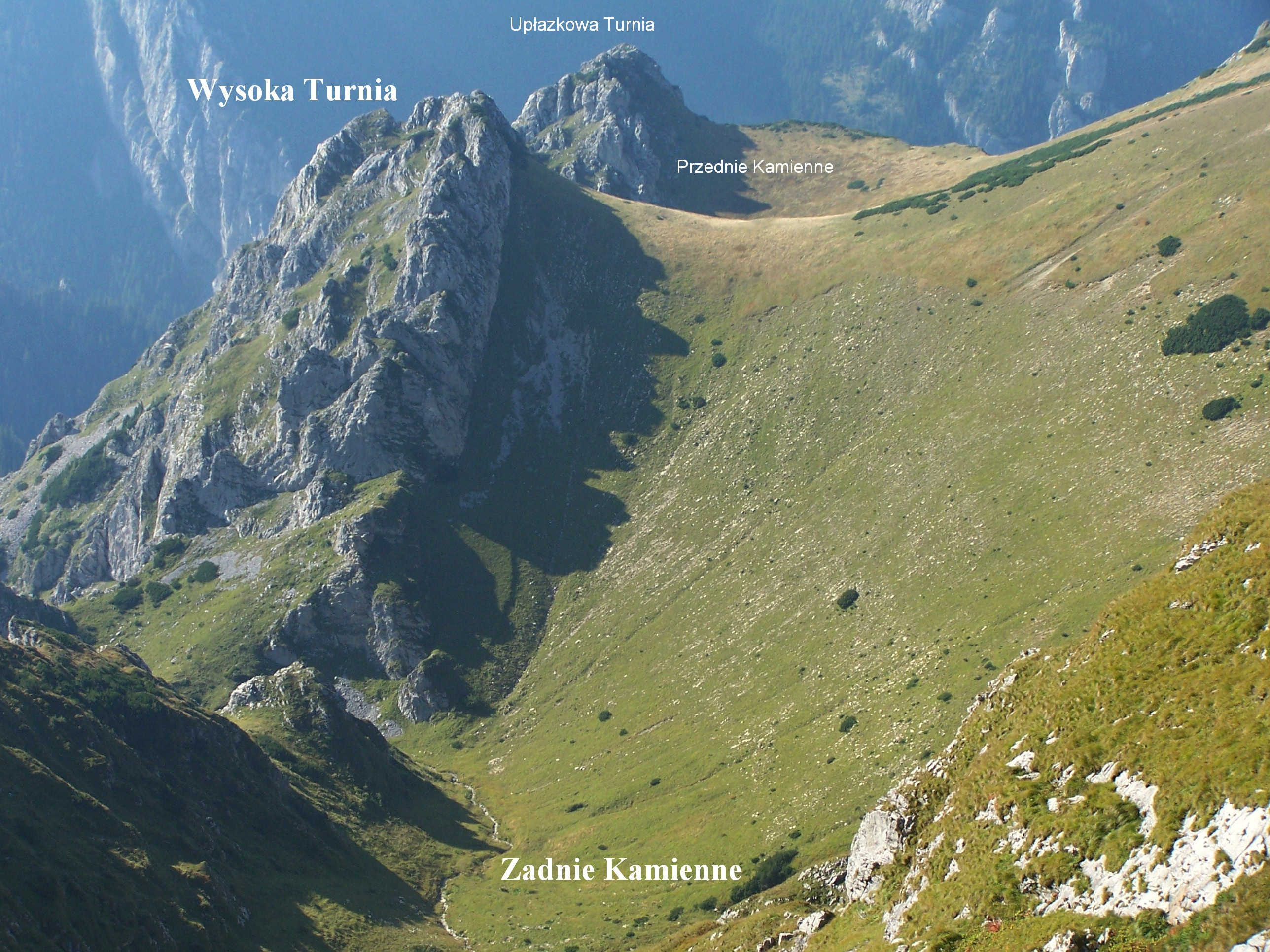 Widok ze szlaku przez Czerwony Żleb